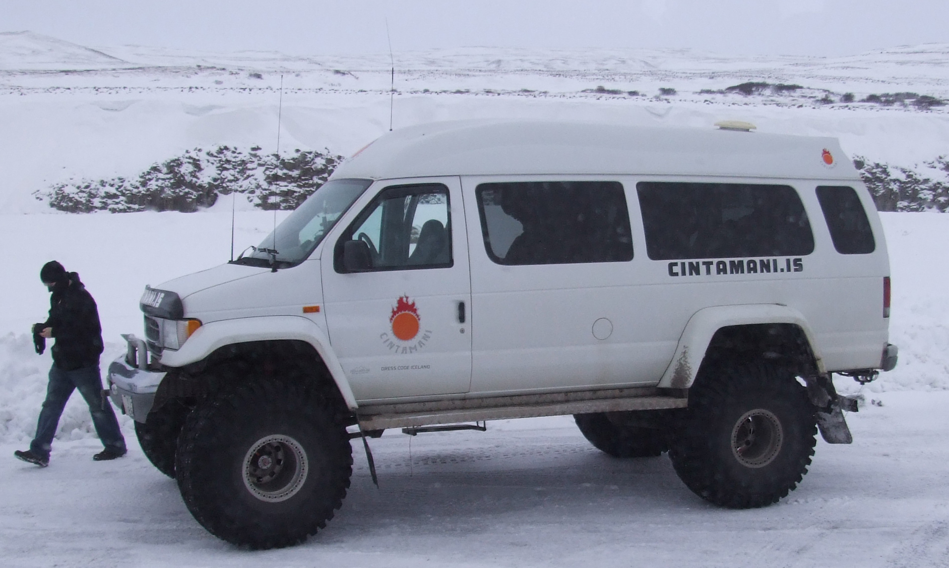 Typischer Umbau eines Autos für die Verhältnisse auf den Straßen Islands